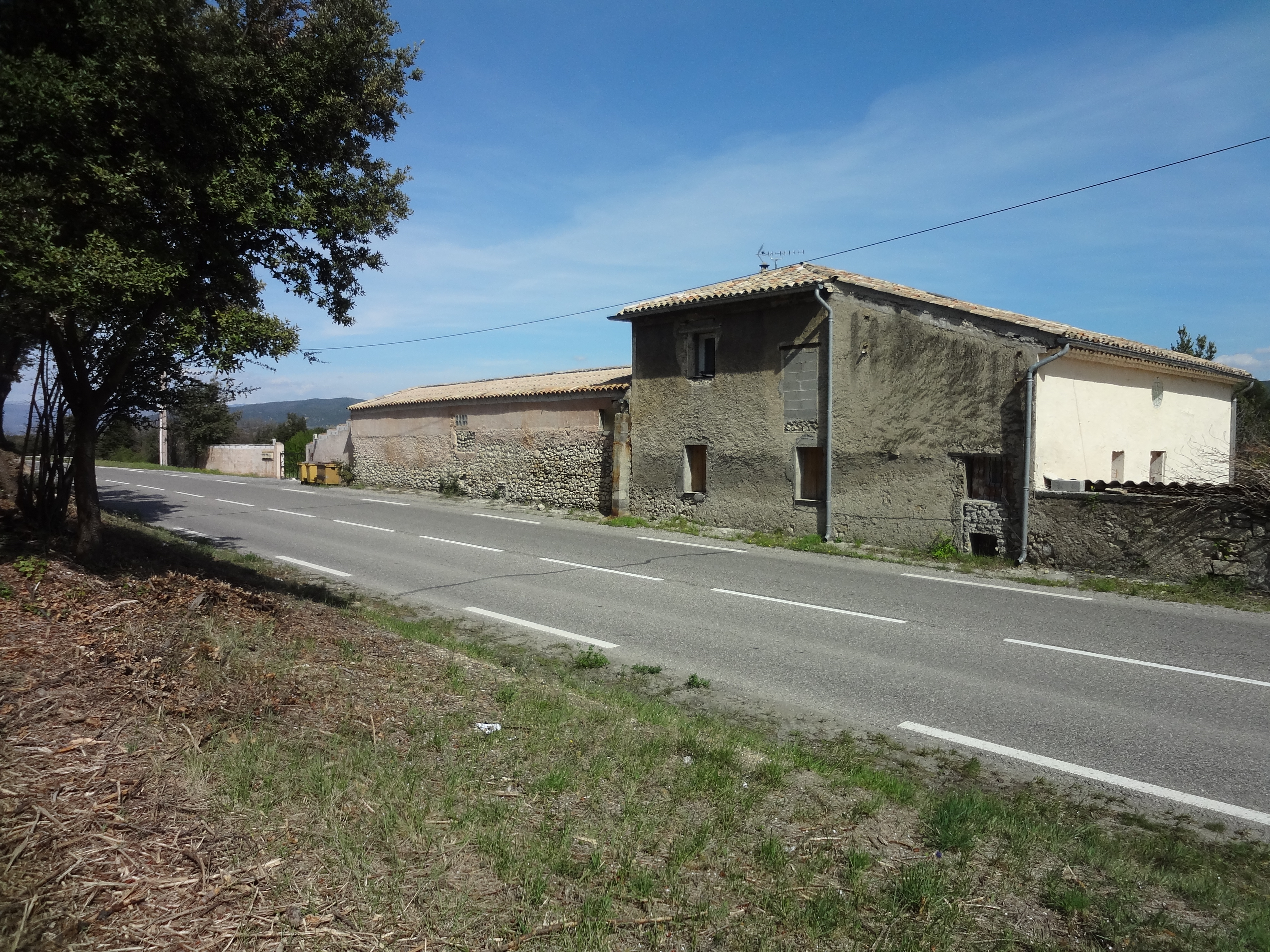 Un des éléments encore visible de l’affaire Dominici